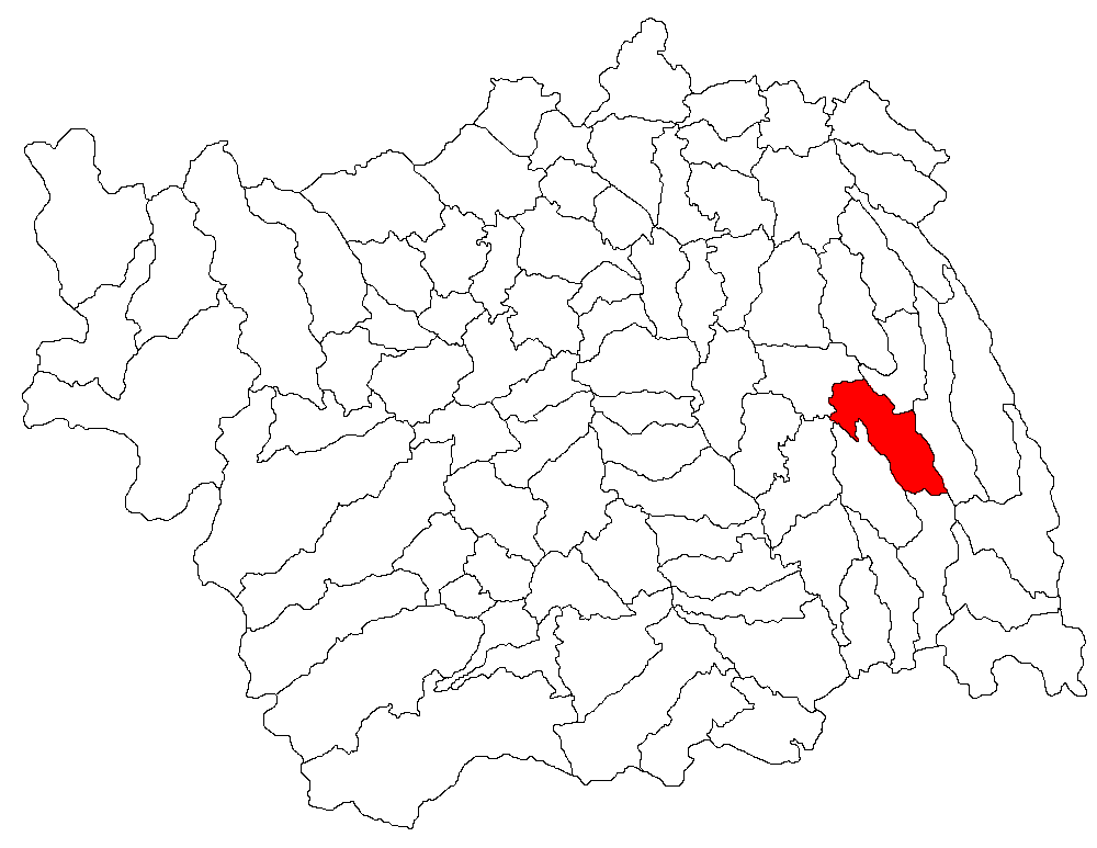 Categorie:Hărţi ale judeţului Bacău